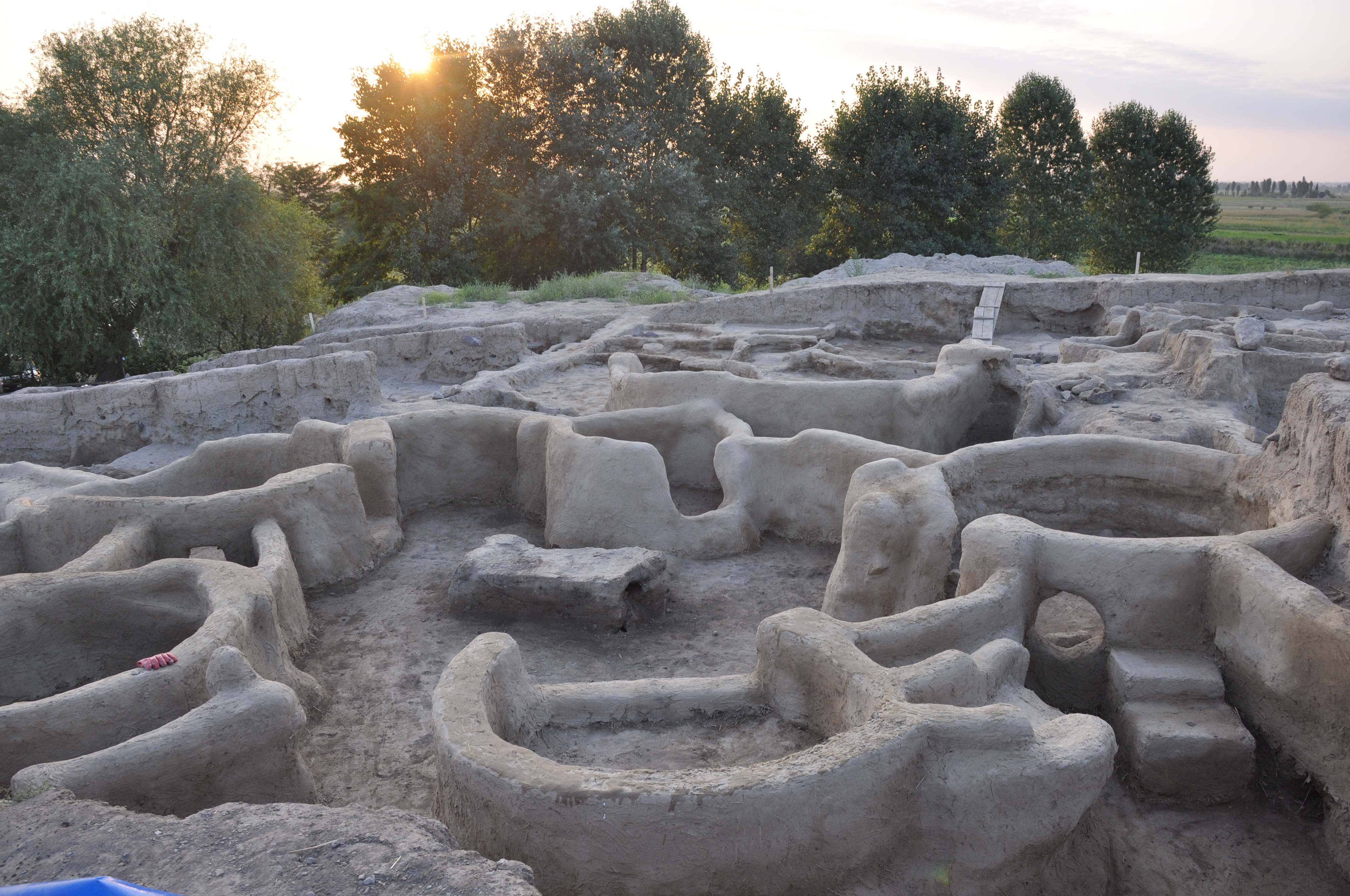 Dairəvi Tikililər (yaşayış evləri)